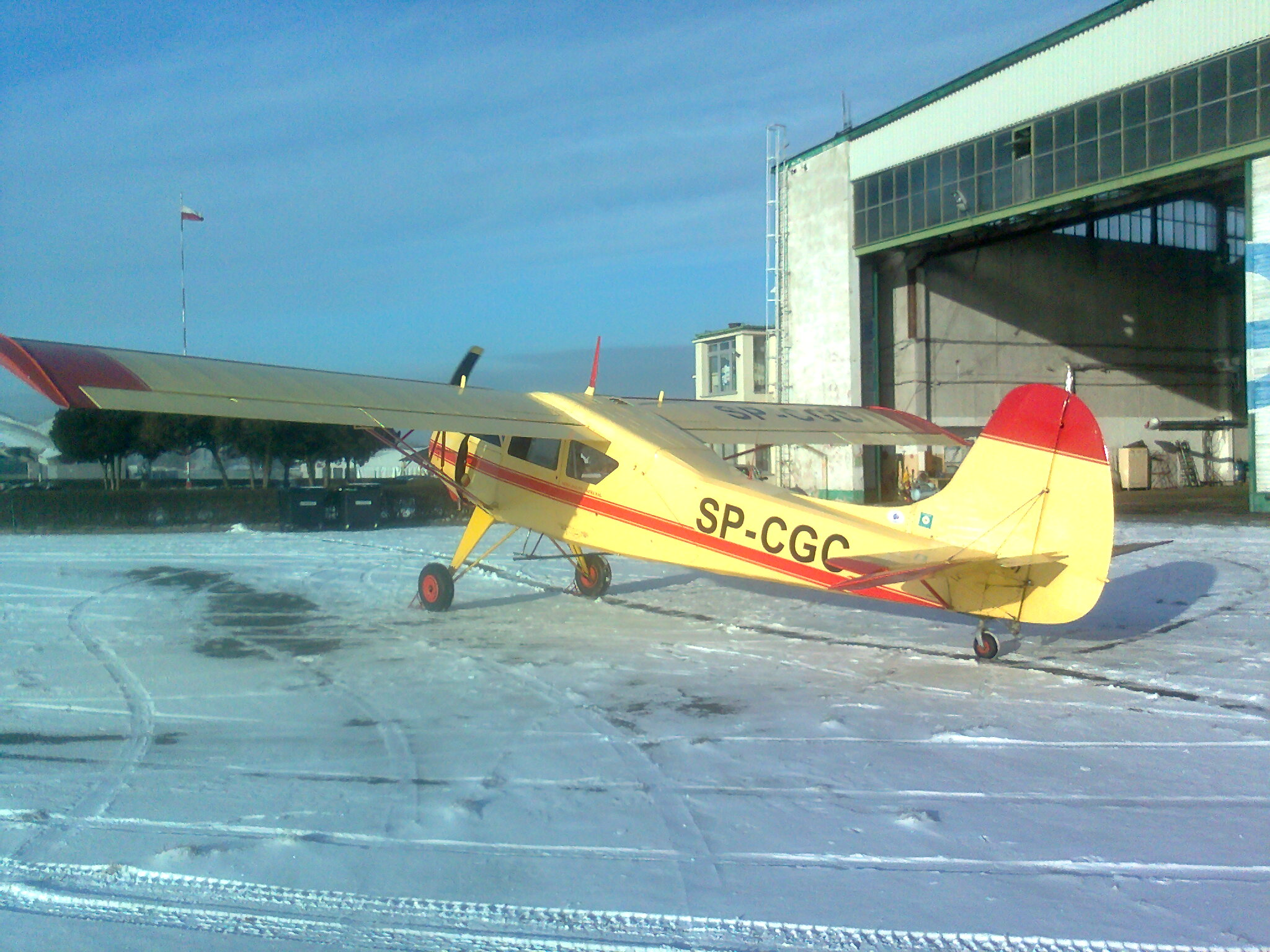 PZL-101 Gawron przed hangarem - Sekcja Spadochronowa Aeroklubu Gliwickiego